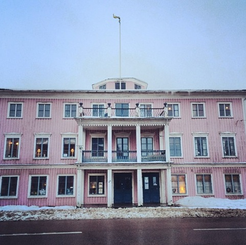 Slottet i Sunne vår 2014.